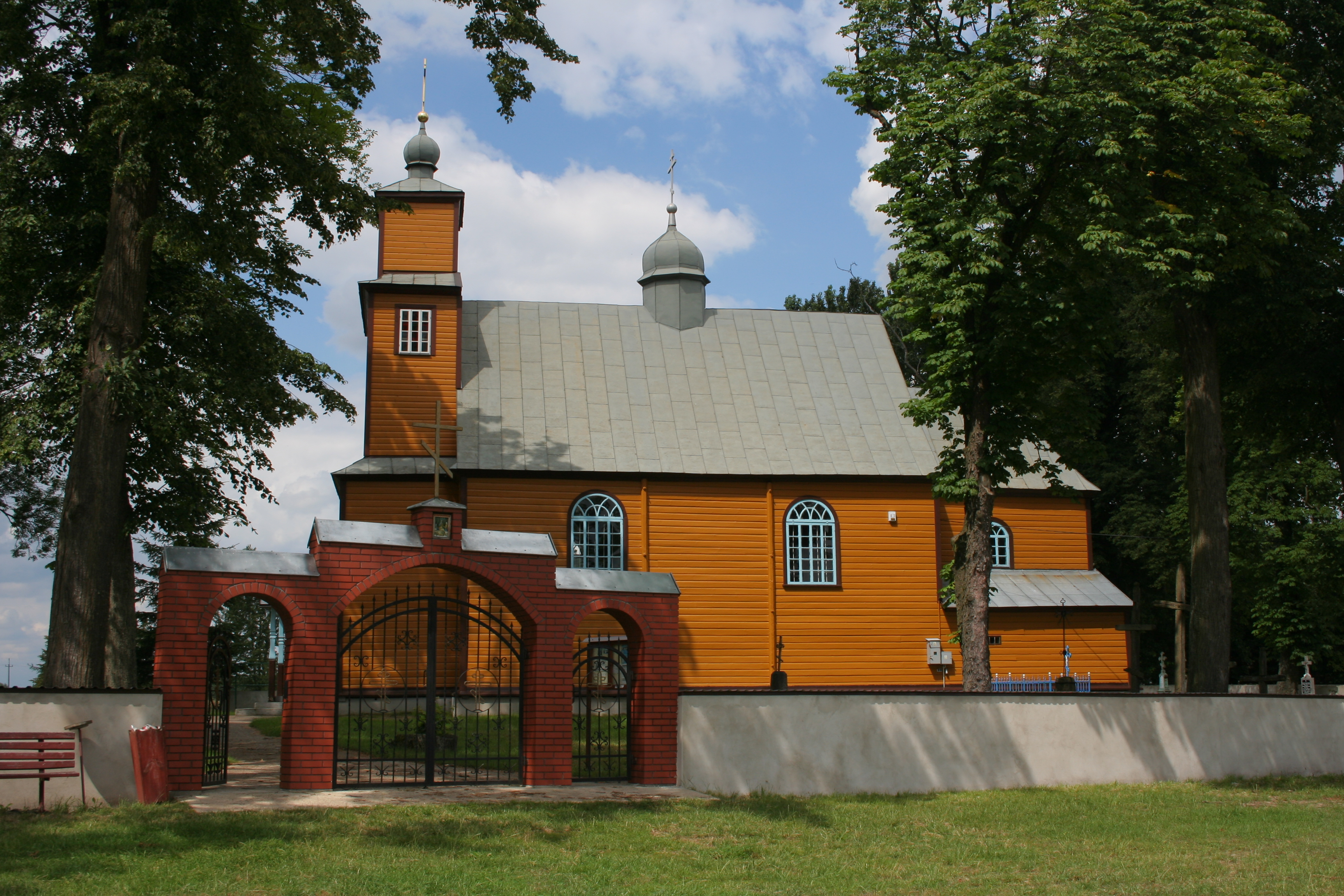 Cerkiew Narodzenia NMP w Rogaczach.